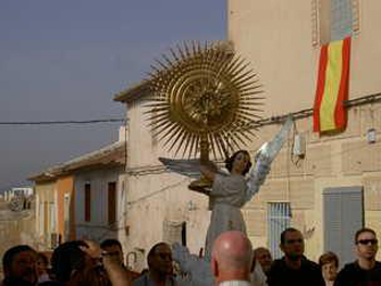 Detalle de laProcesión de la Virgen de Orito